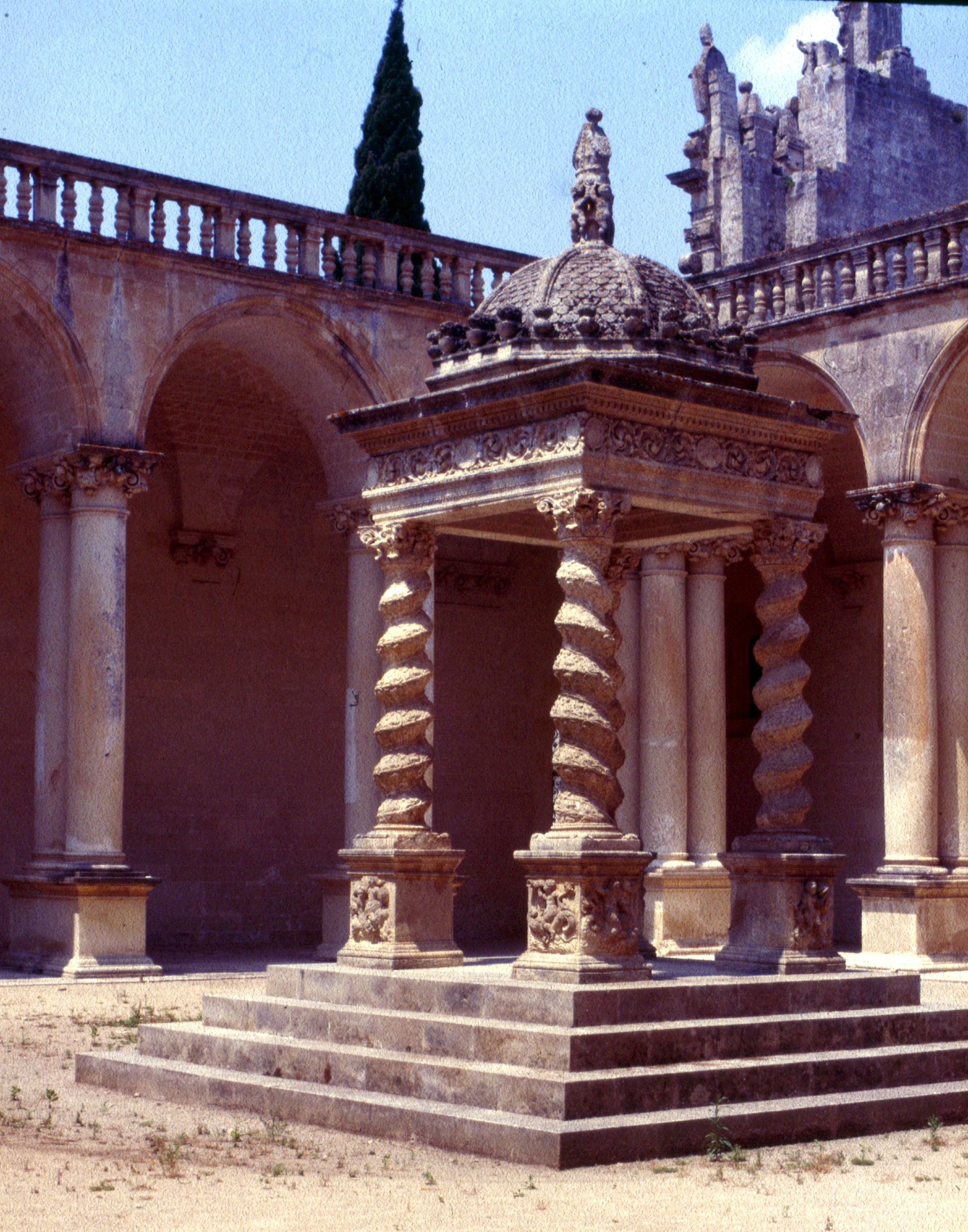 Santi Niccolò e Cataldo (Lecce)